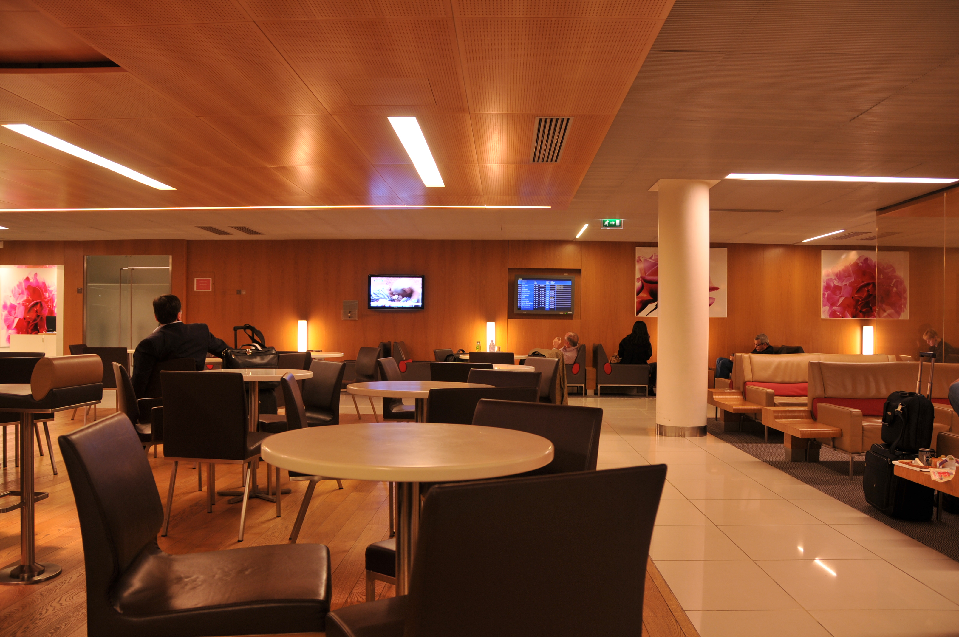 Le salon d'Air France au terminal 2E de l'aéroport CDG Paris.